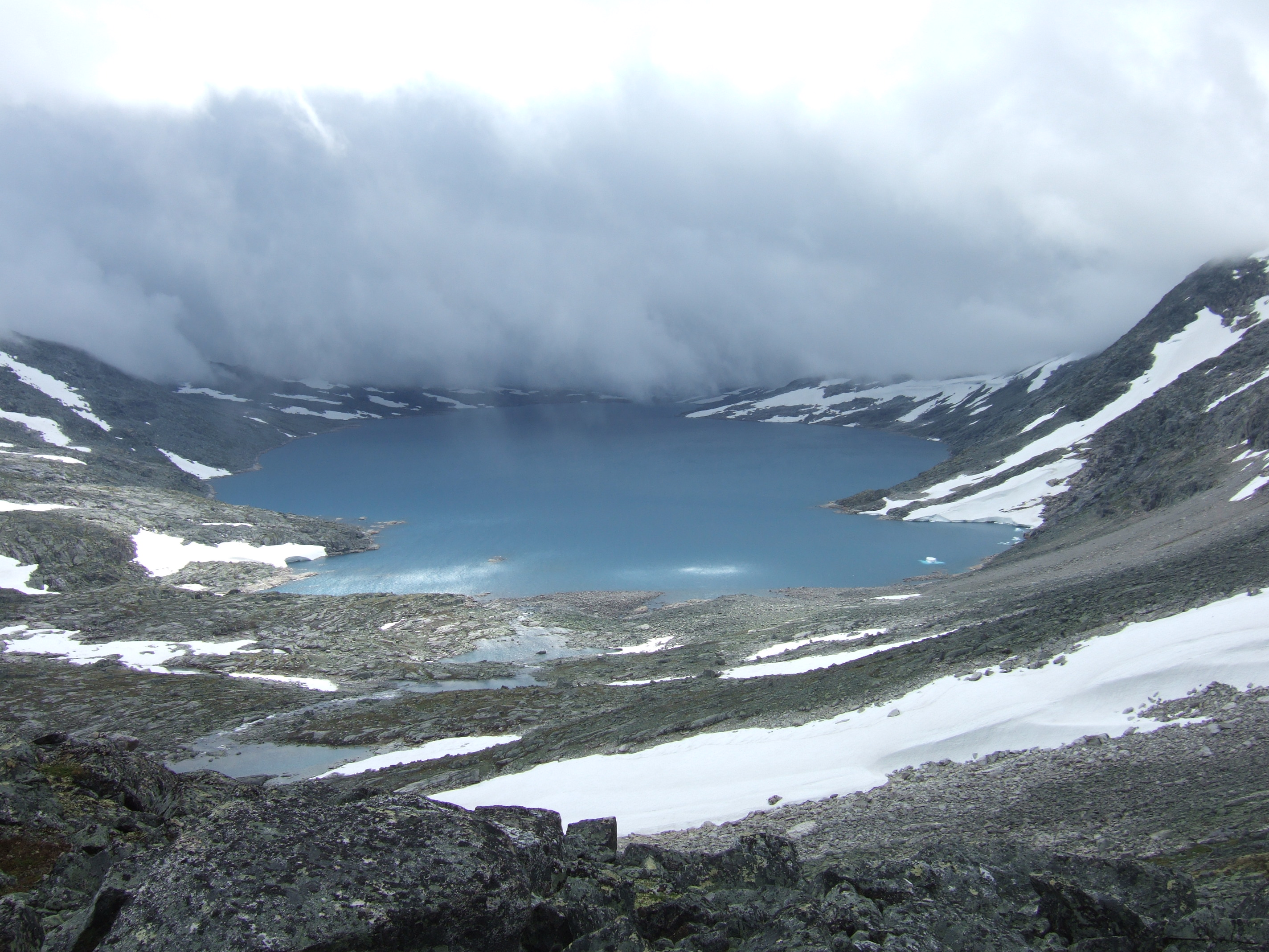 Illvatnet ligger i Breheimen. Det går T-merket rute langs østsiden av vannet.